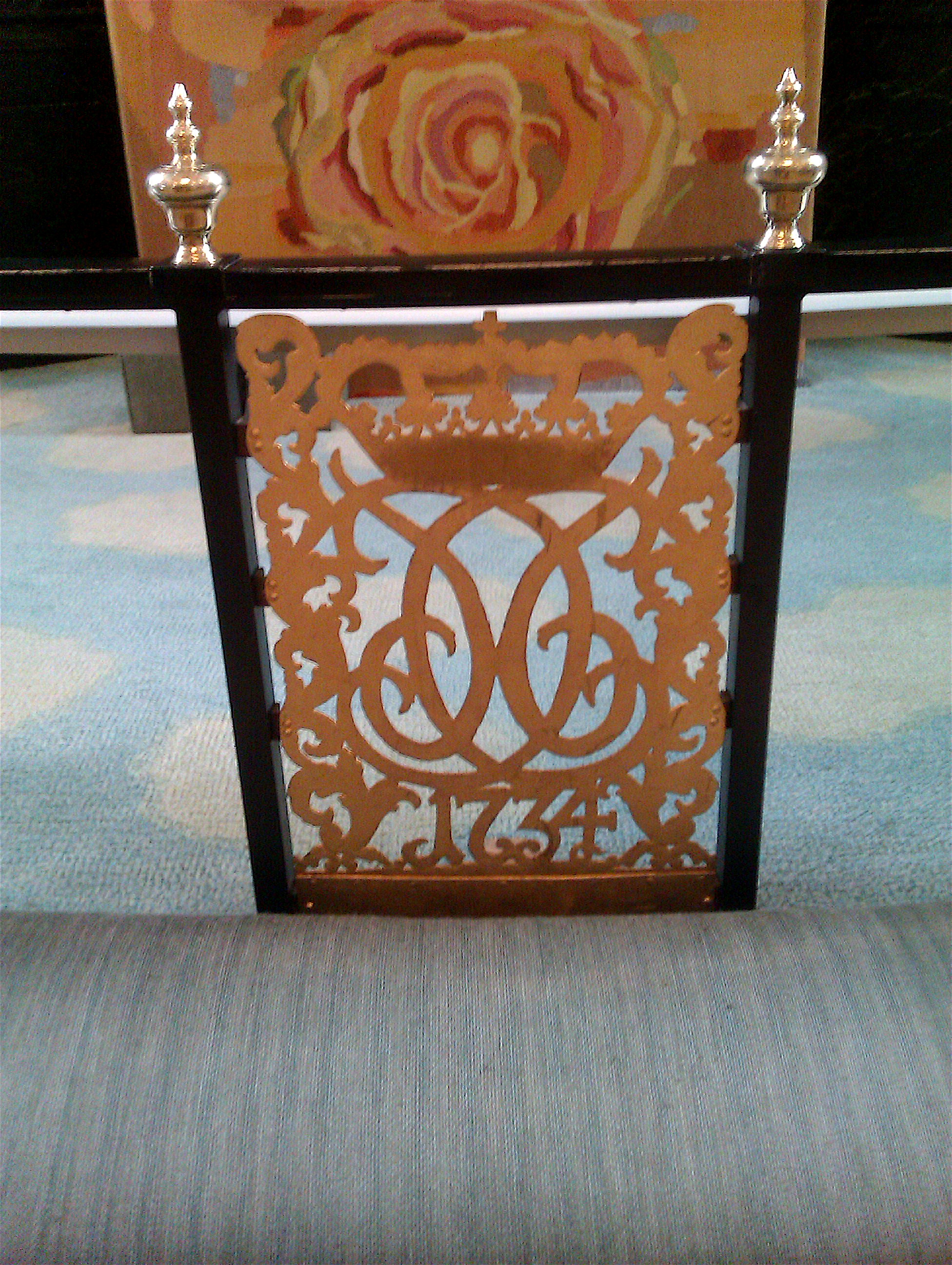 Christian VIs spejlmonogram ved alteret i Frederiksberg Kirke, Frederiksberg, Sjælland